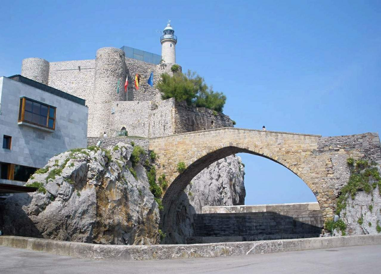 Castillo-Faro y Puente Medieval de Castro Urdiales (Cantabria)